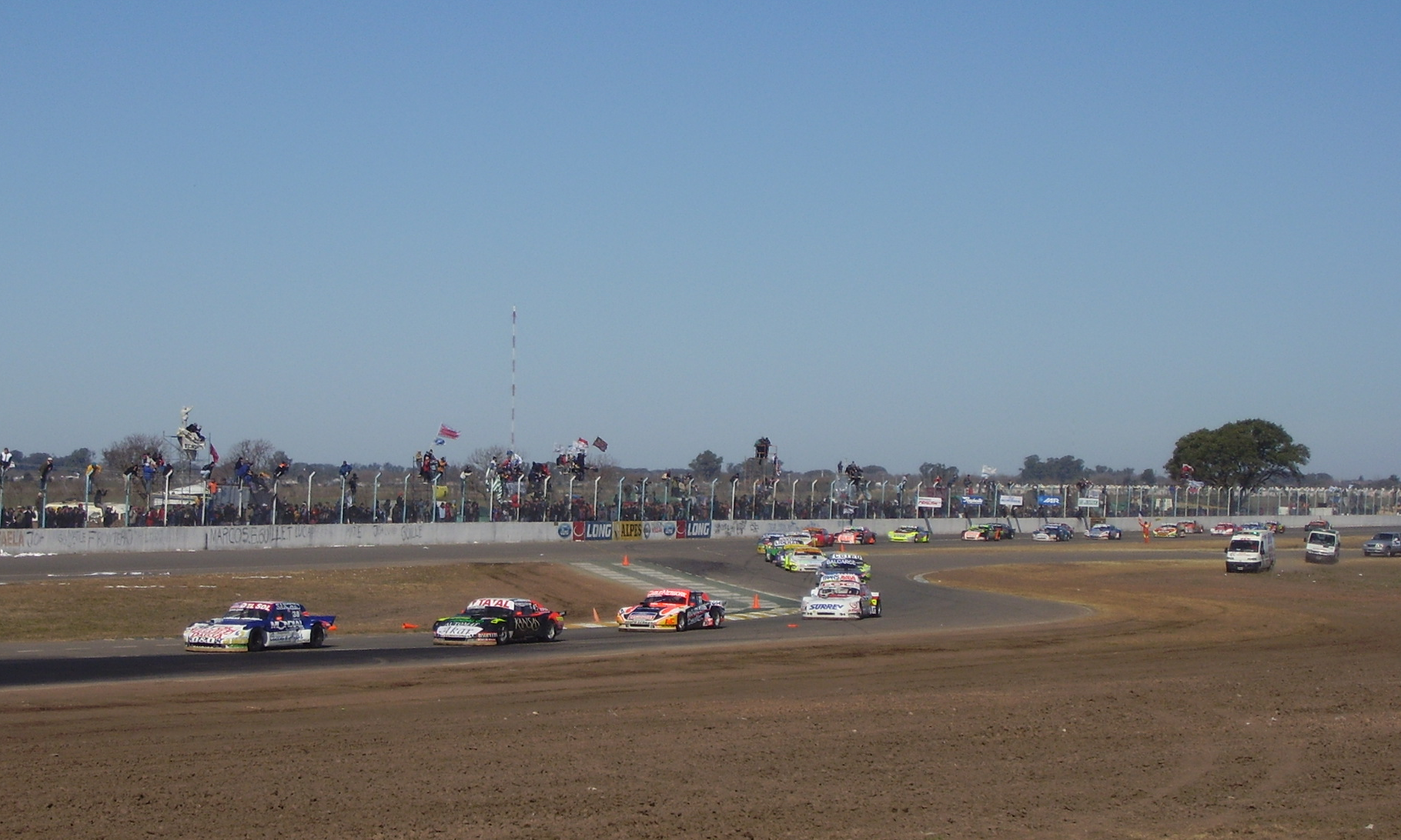 Largada de la final del Turismo Carretera, en el Autódromo de Rafaela de la temporada 2007